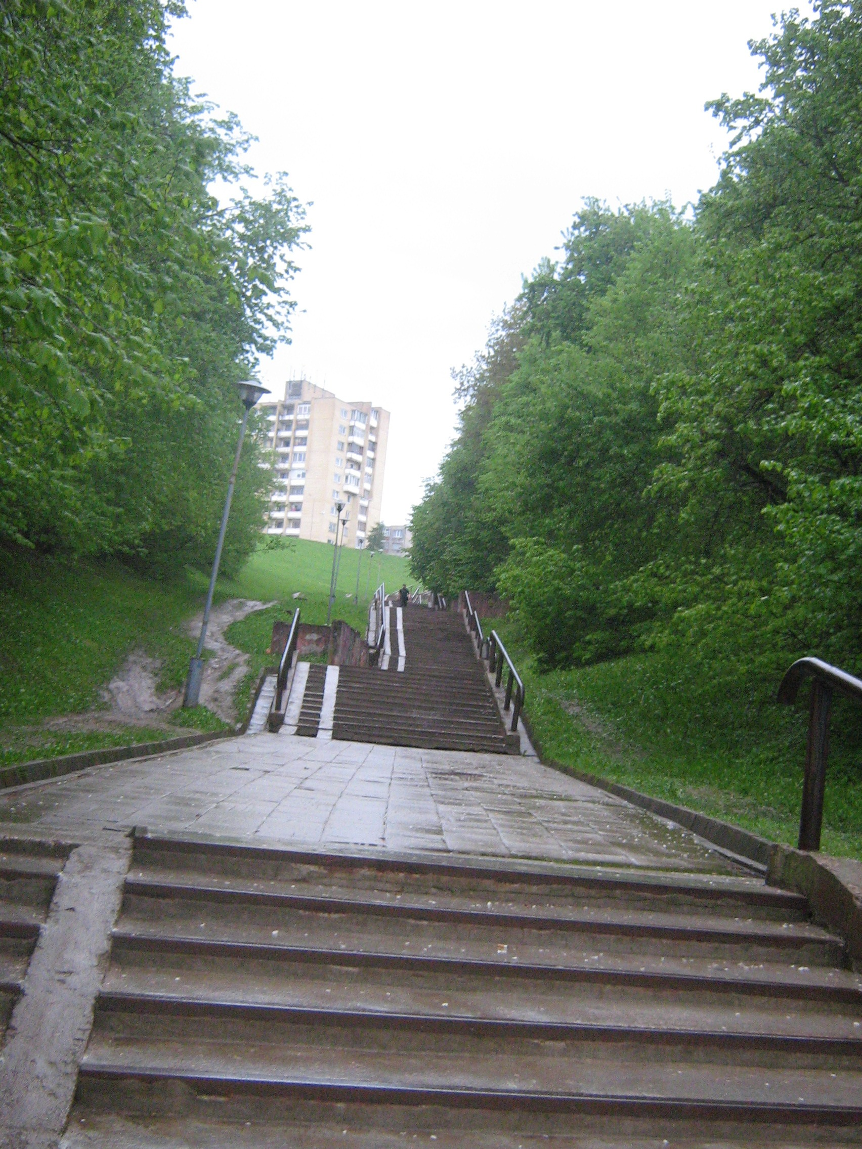 Jonavos Senieji laiptai iš apačios